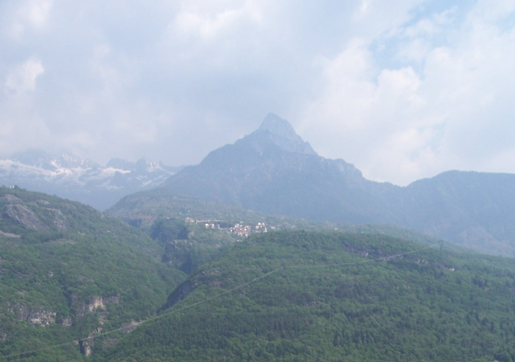 Cimbergo, Val Camonica, Italia